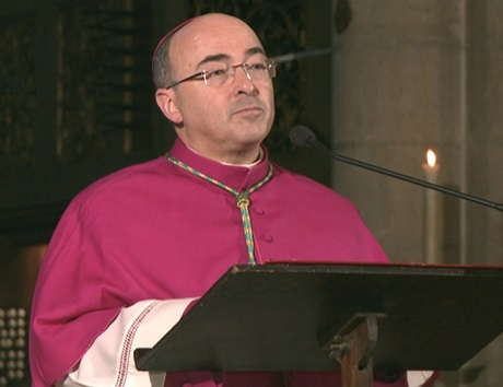 D. Nuno Brás, bispo titular de Elvas e auxiliar de Lisboa